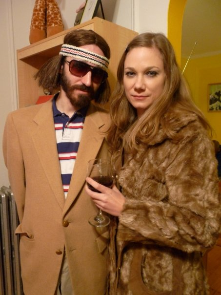 Fans du film déguisés en Margot et Richie Tenenbaum.